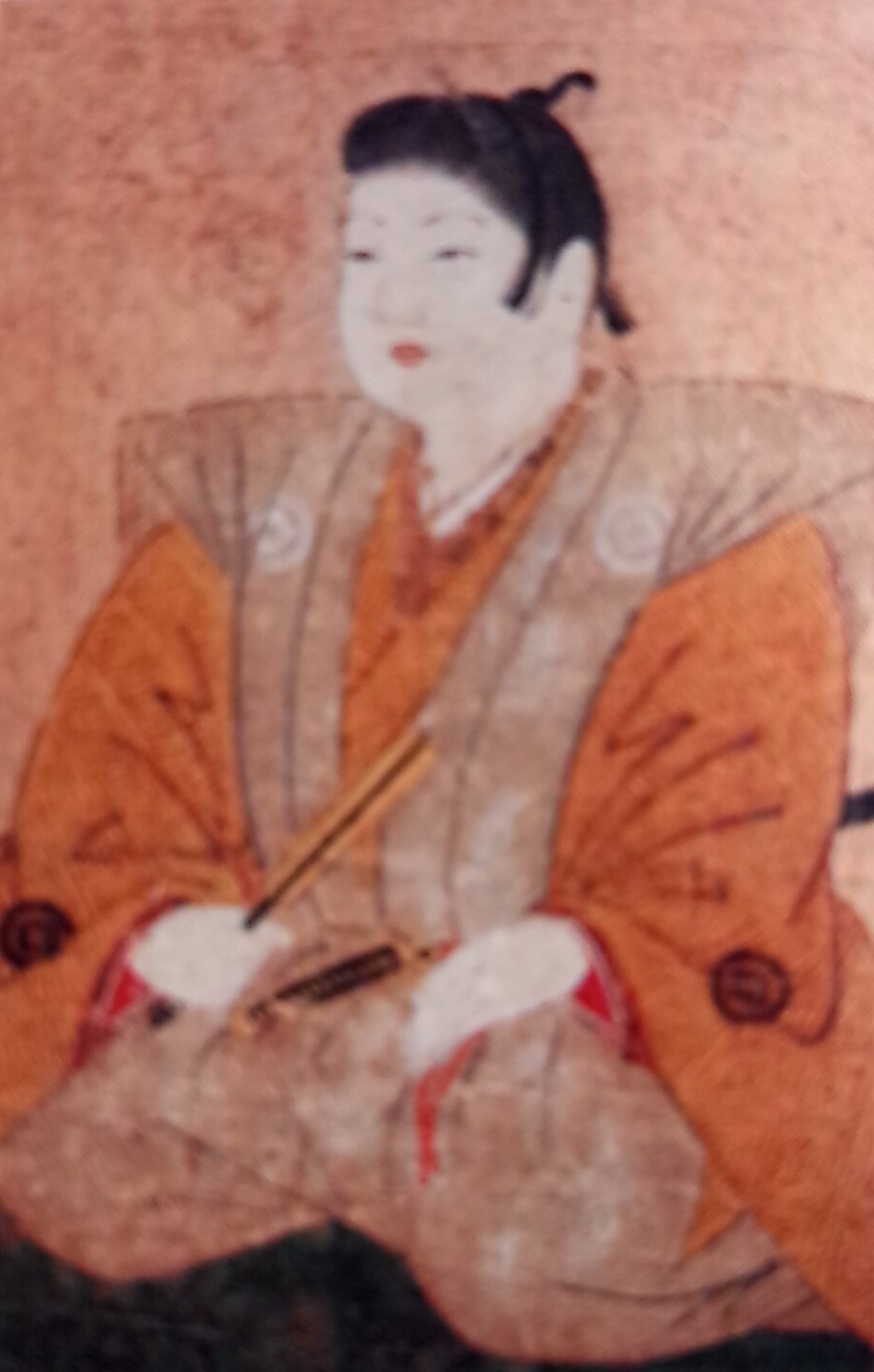 菅沼定昭の肖像。